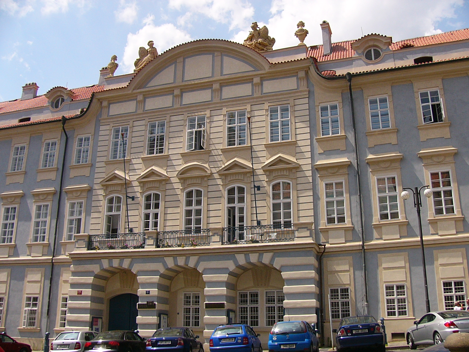 Lichtenštejnský palác, Malostranské náměstí, Praha, Dnes sídlo Hudební fakulty Akademie múzických umění